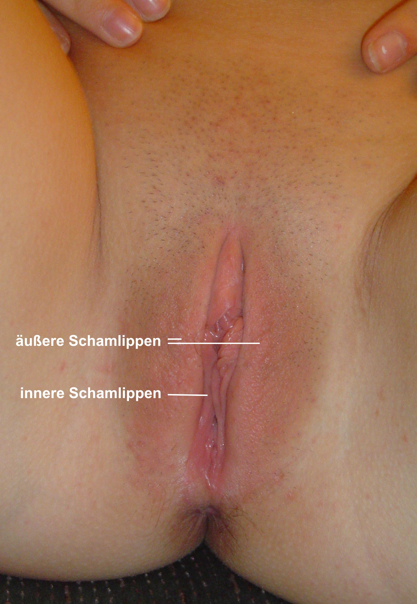 Innere und Äußere Schamlippen einer erwachsenen frau